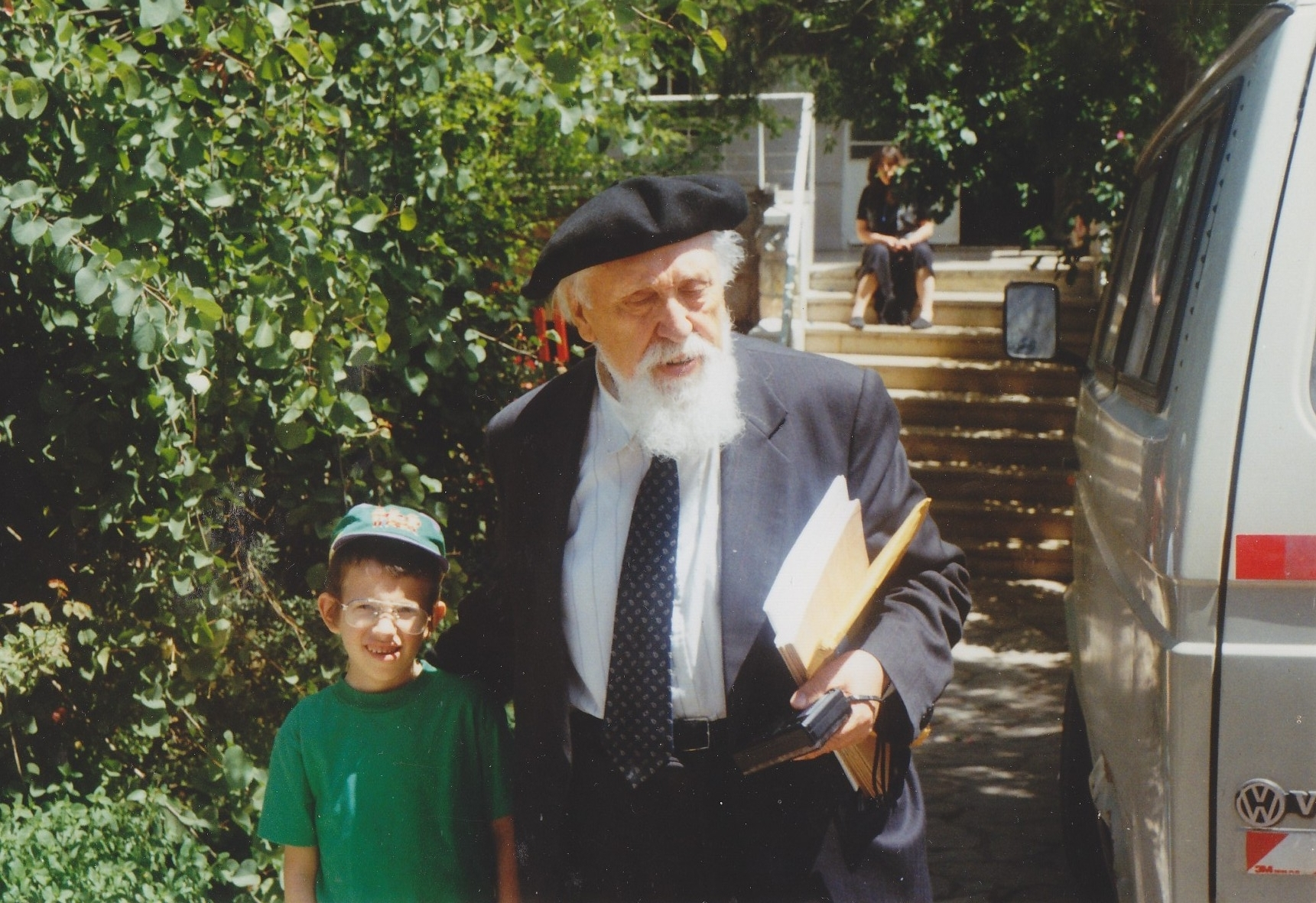 Ezriel_&_prof_Feuerstein